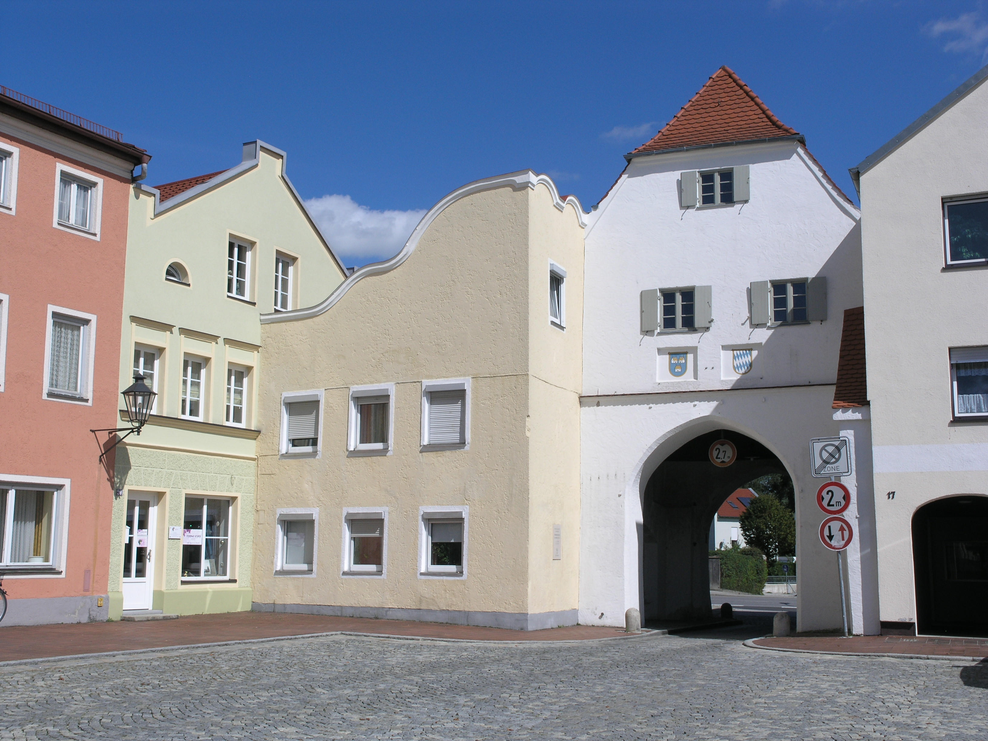 Altöttinger Tor mit Halbhaus und kleinem Wohnhaus, am Unteren Markt in 84405 Dorfen, Bayern Unterer Markt 18. Unteres Tor (Altöttinger Tor), mit Krüppelwalmdach, um 1530. Unterer Markt 19. Halbhaus mit Schweifgiebel, 18. Jh. Unterer Markt 20. Kleines Wohnhaus mit Rauputzgliederung und Fensterbekrönungen, um 1860/70.